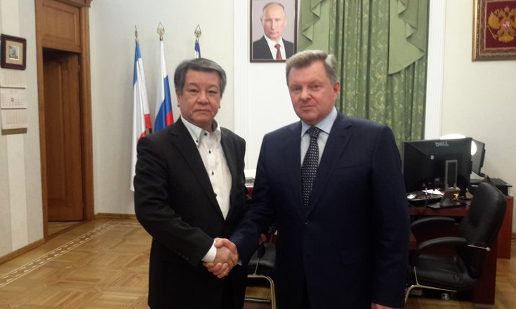 Председатель японской общественно-политической организации «Иссуй-Кай» Мицухиро Кимура и полпред Президента России в Крымском федеральном округе Олег Белавенцев